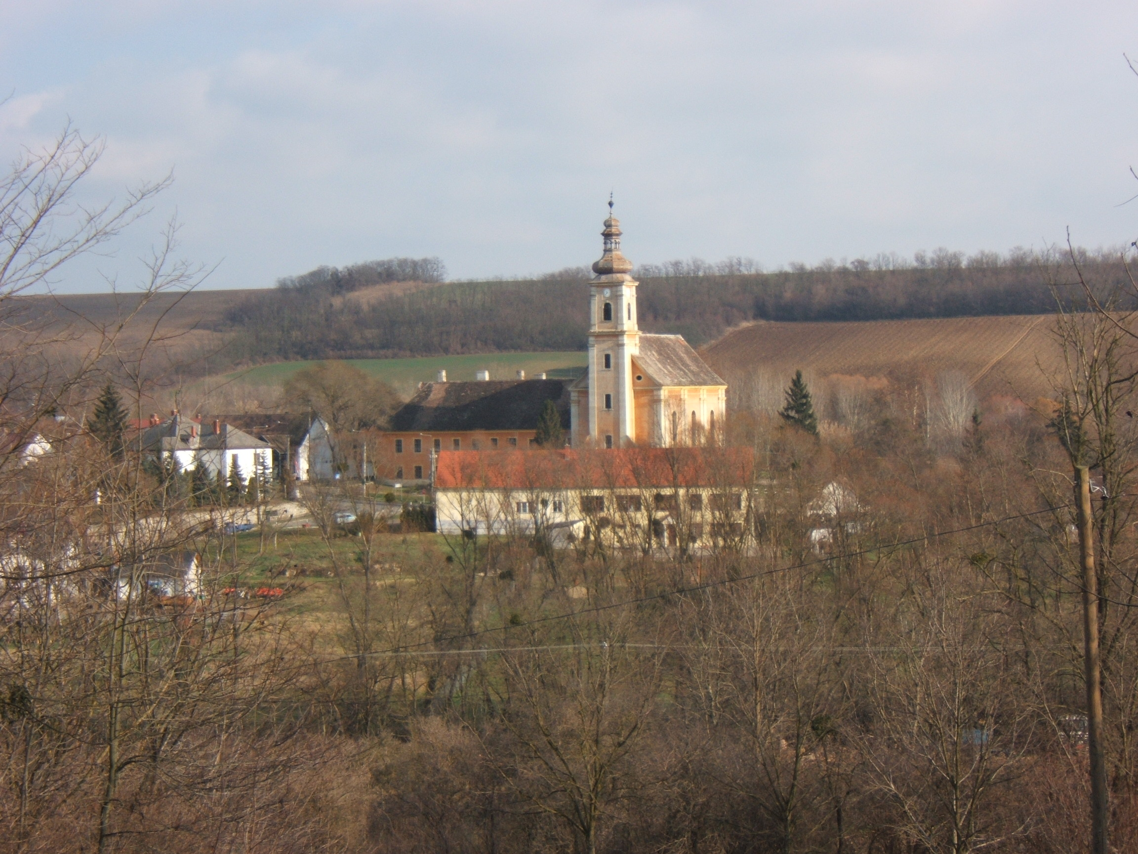 Kilátás az andocsi kálváriától